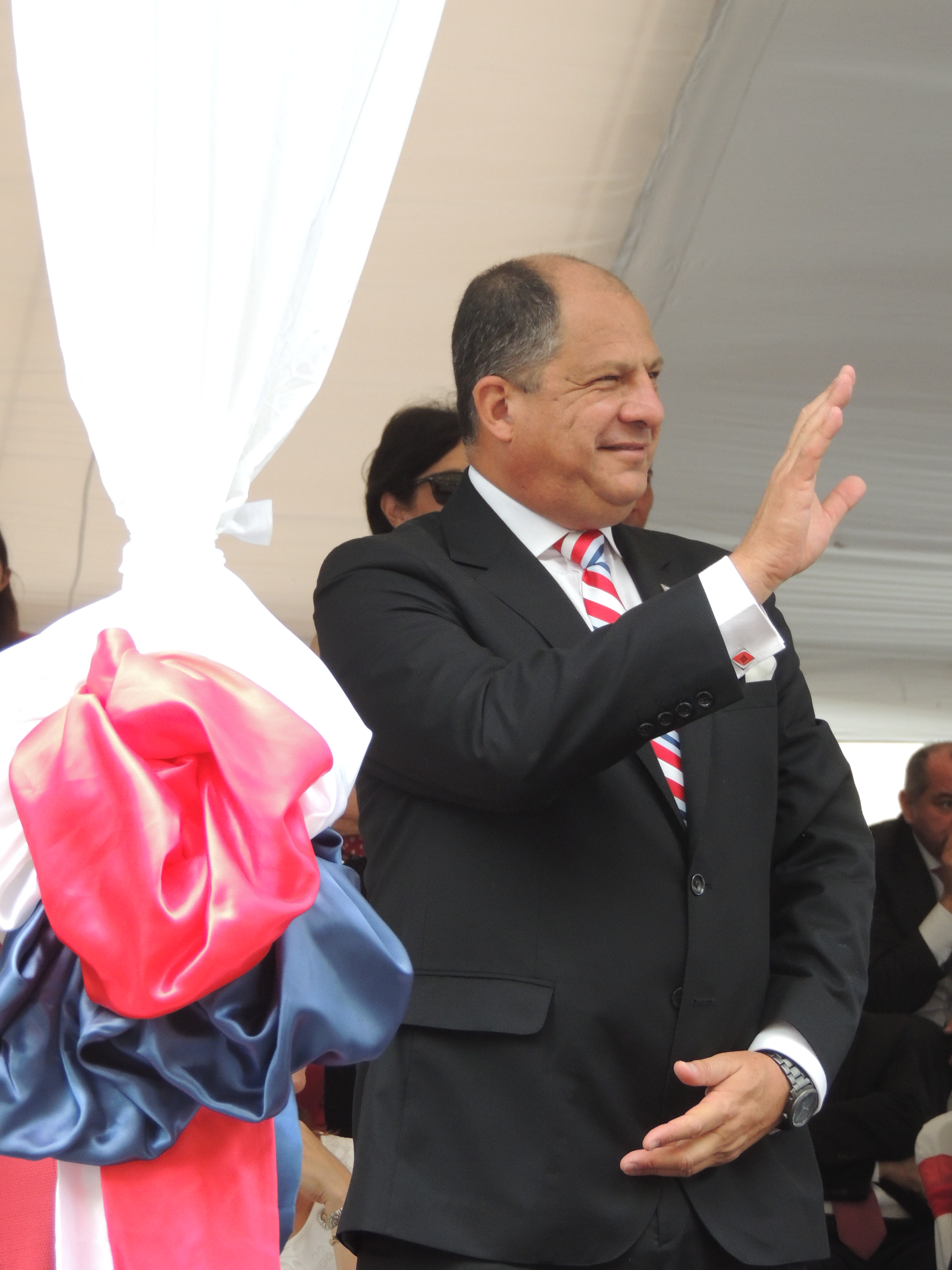 Luis Guillermo Solís, Presidente de Costa Rica